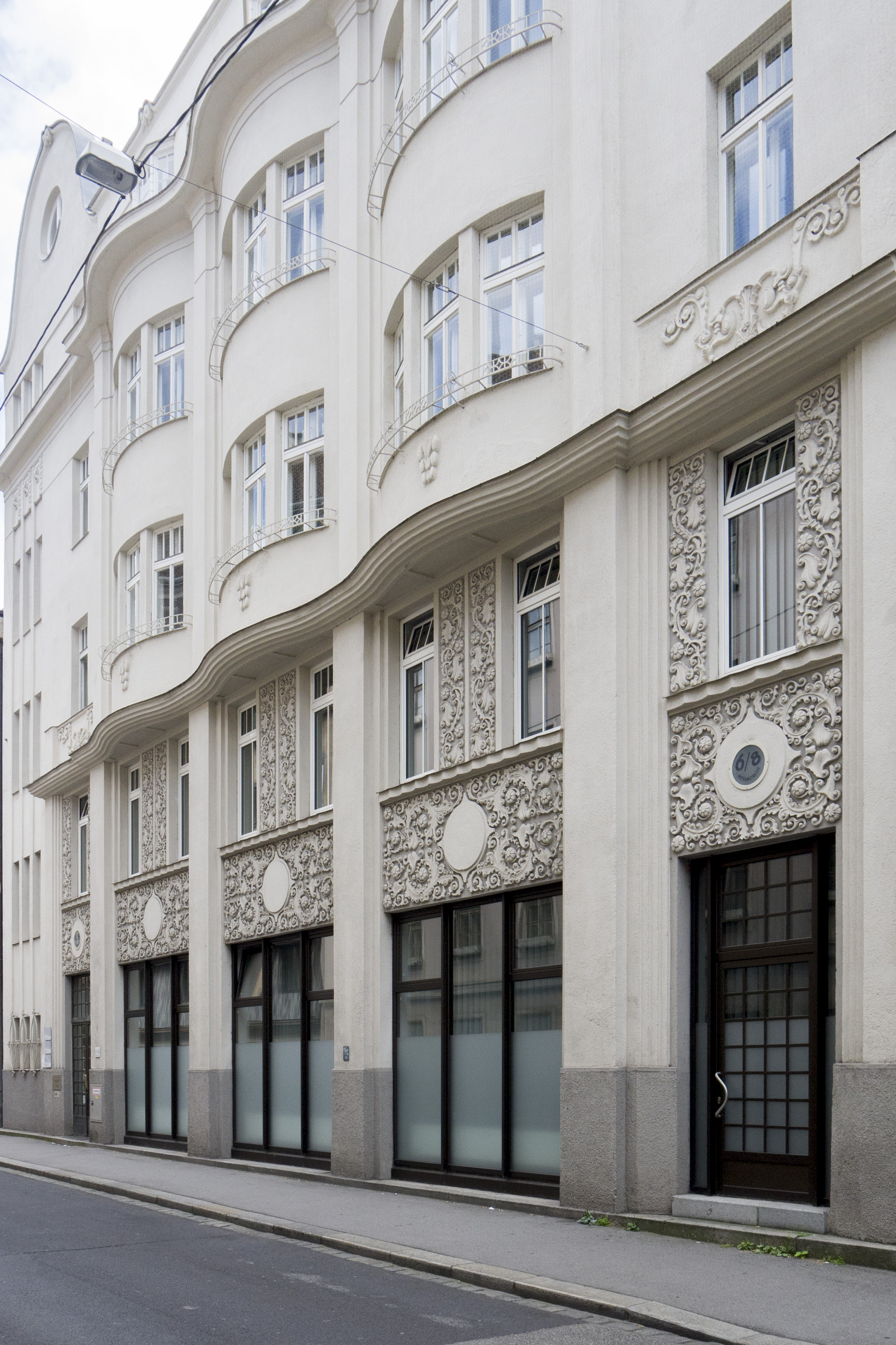 Linz Jugendstil Museumstraße 6-8